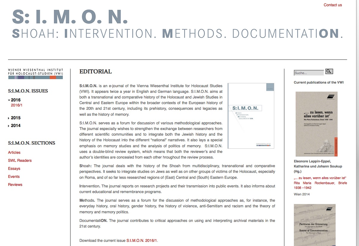 Titelbild der E-Zeitschrift des Wiener Wiesenthal Instituts für Holocaust-Studien VWI